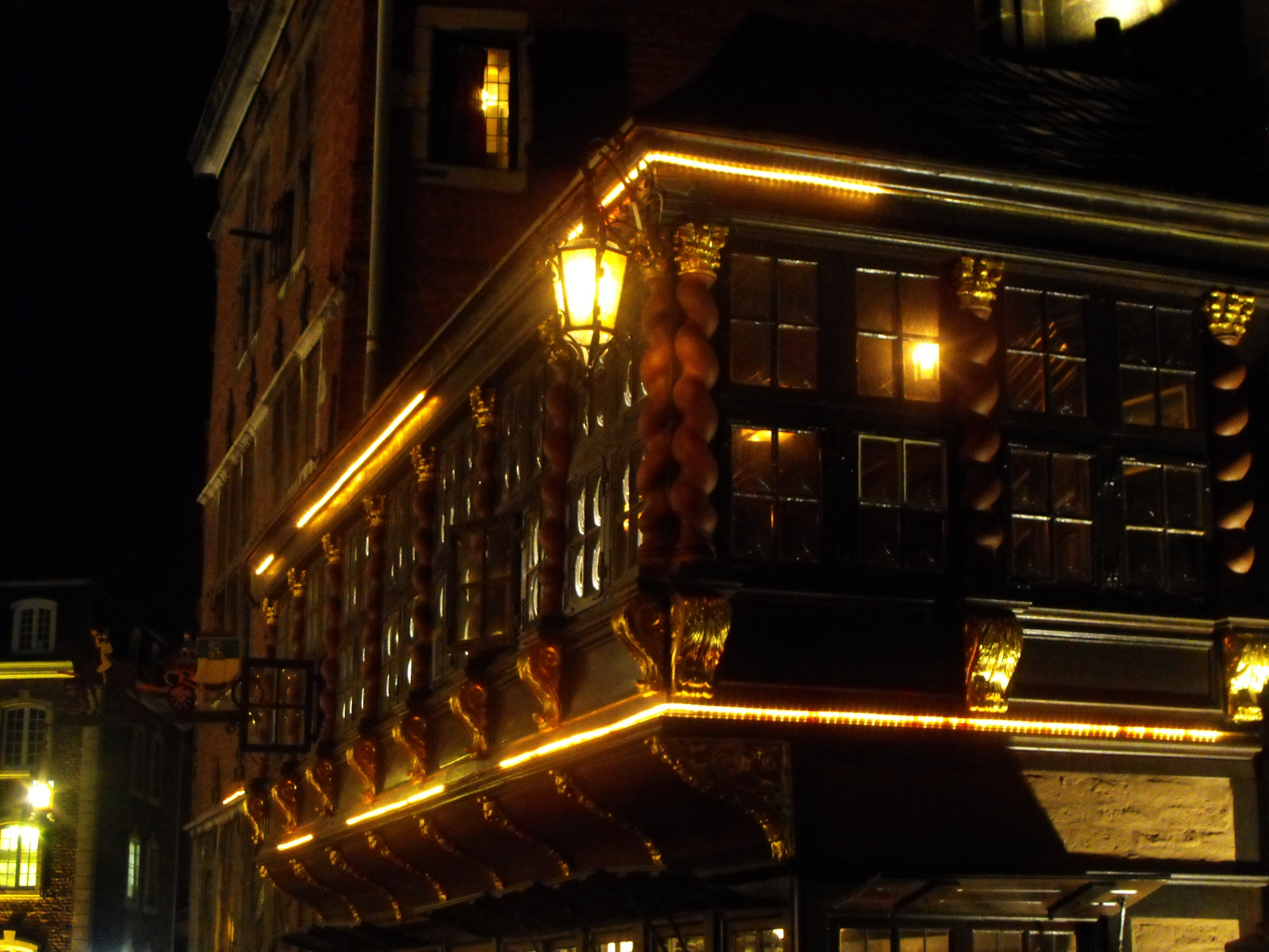 Historische Gaststätte "Postwagen" am Aachener Rathaus bei Nacht